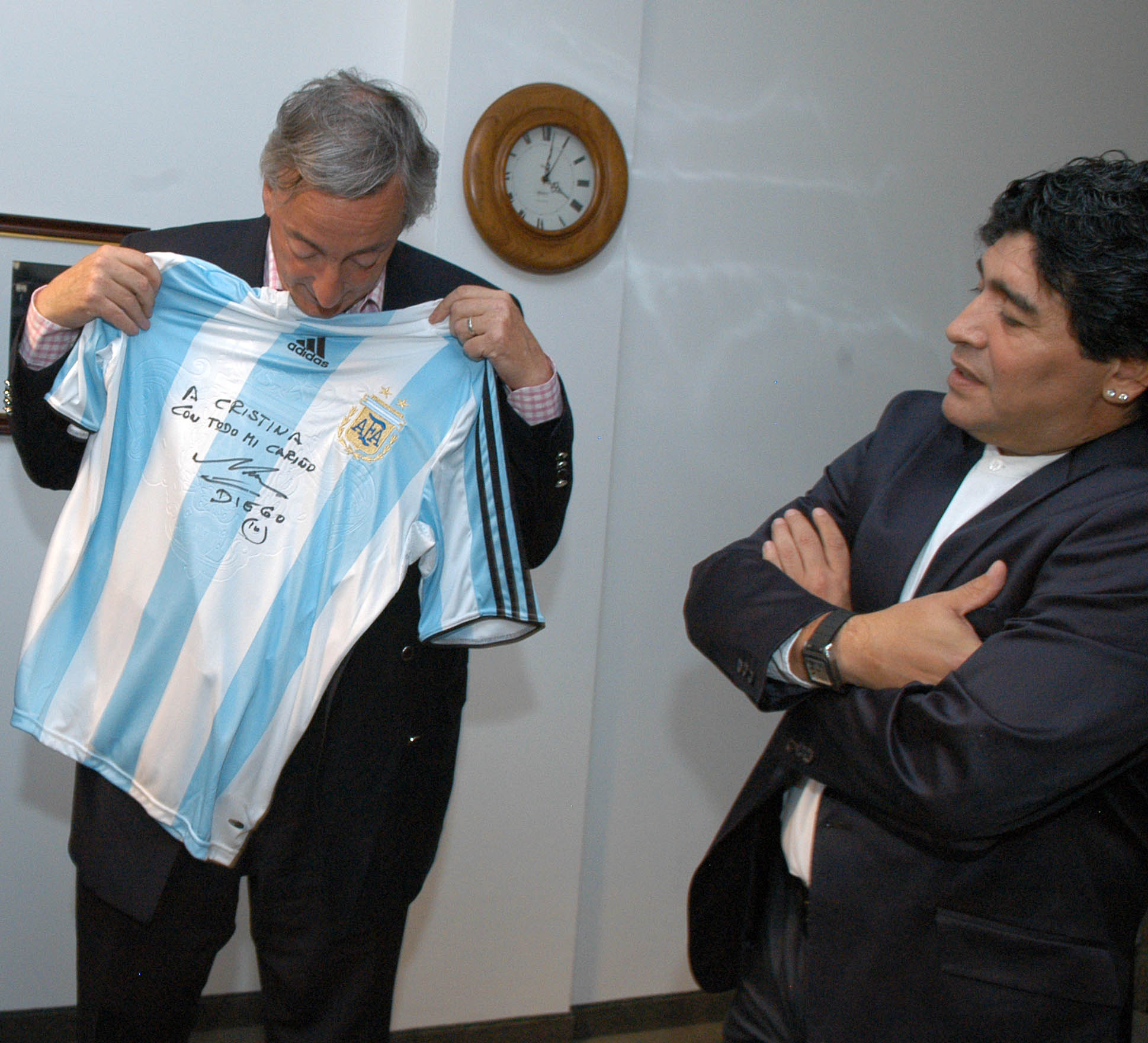 El ex Presidente Néstor Kirchner junto a Diego Maradona.